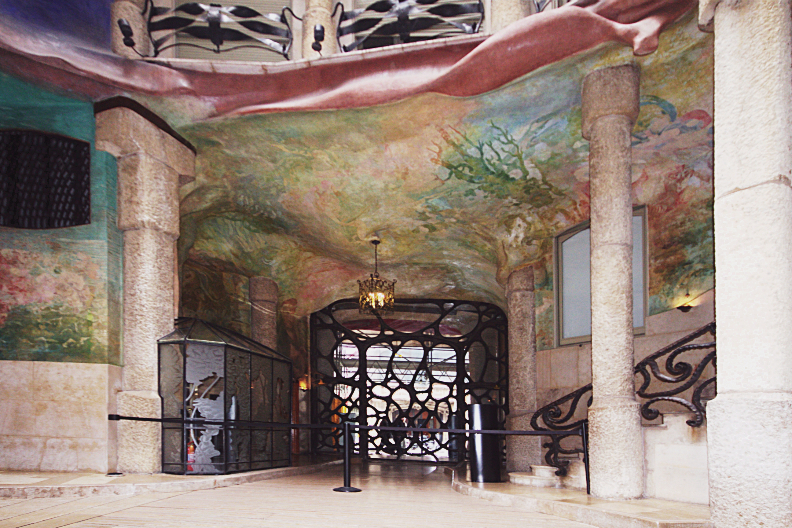 Portão principal da Casa Milà